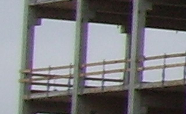 Ausschnitt aus einem Digitalfoto mit ausgeprägter chromatischer Aberration